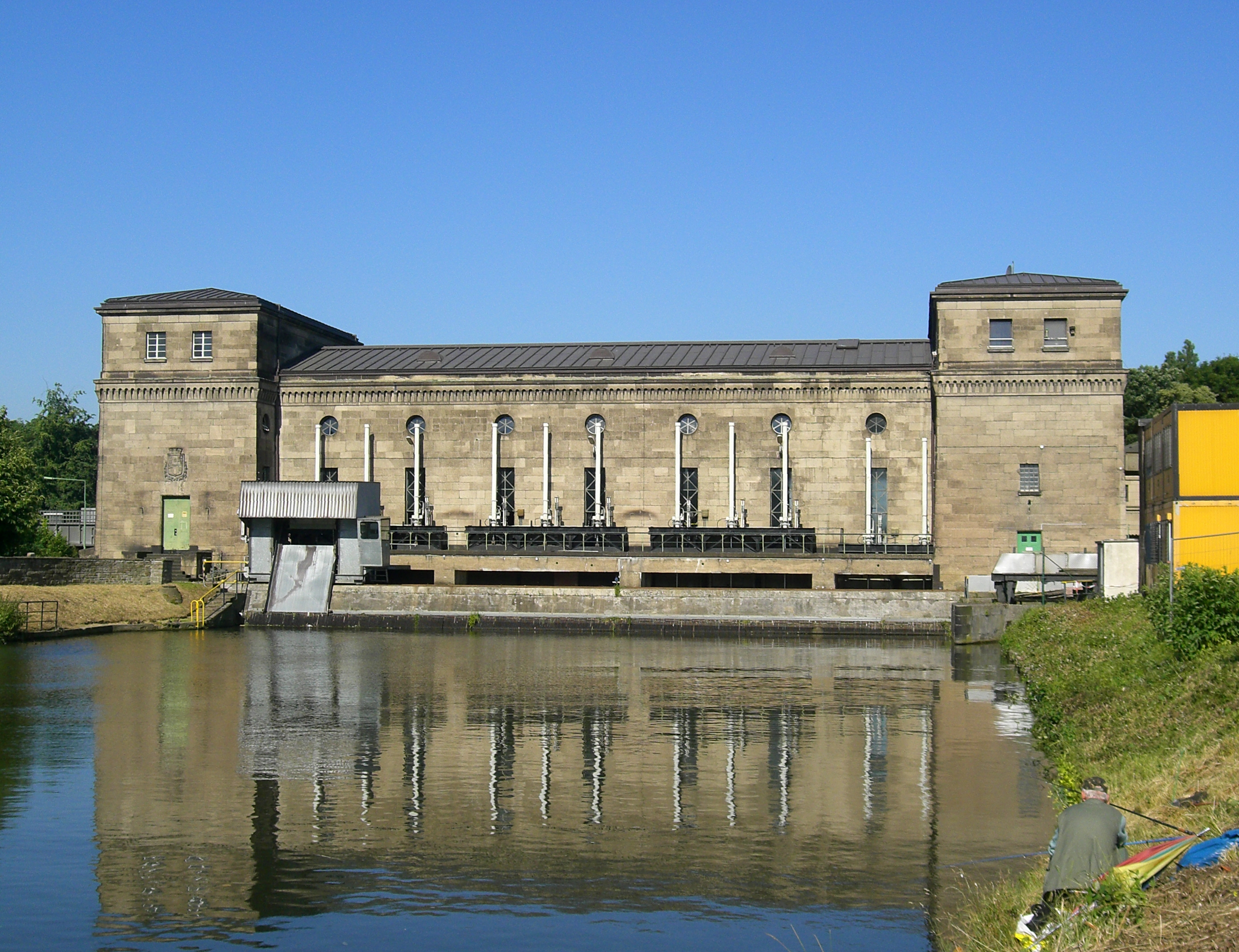 Wasserkraftwerk Raffelberg in Mülheim vom Oberwasser aus gesehen